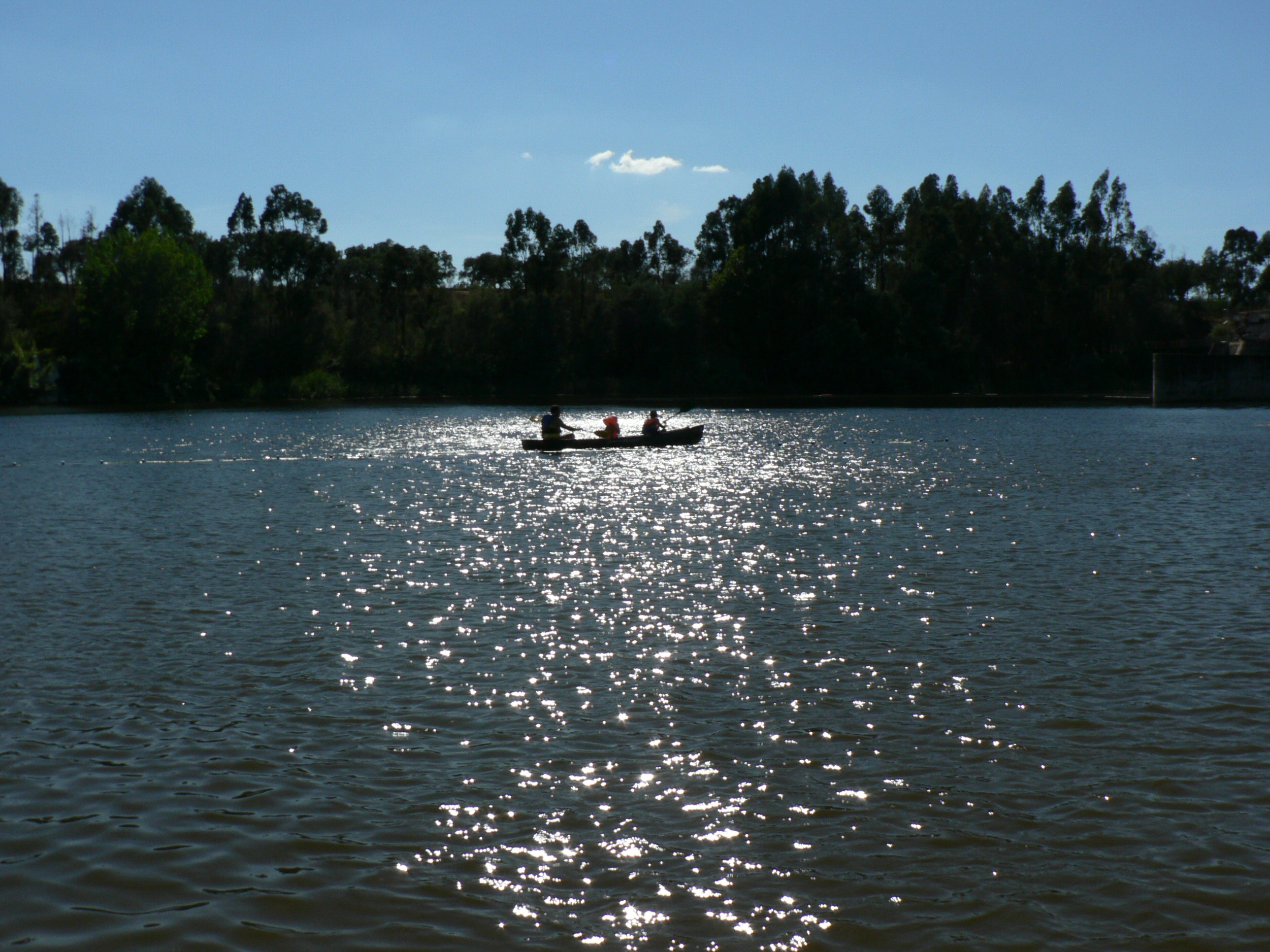 Vista do Parque Ecológico do Gameiro